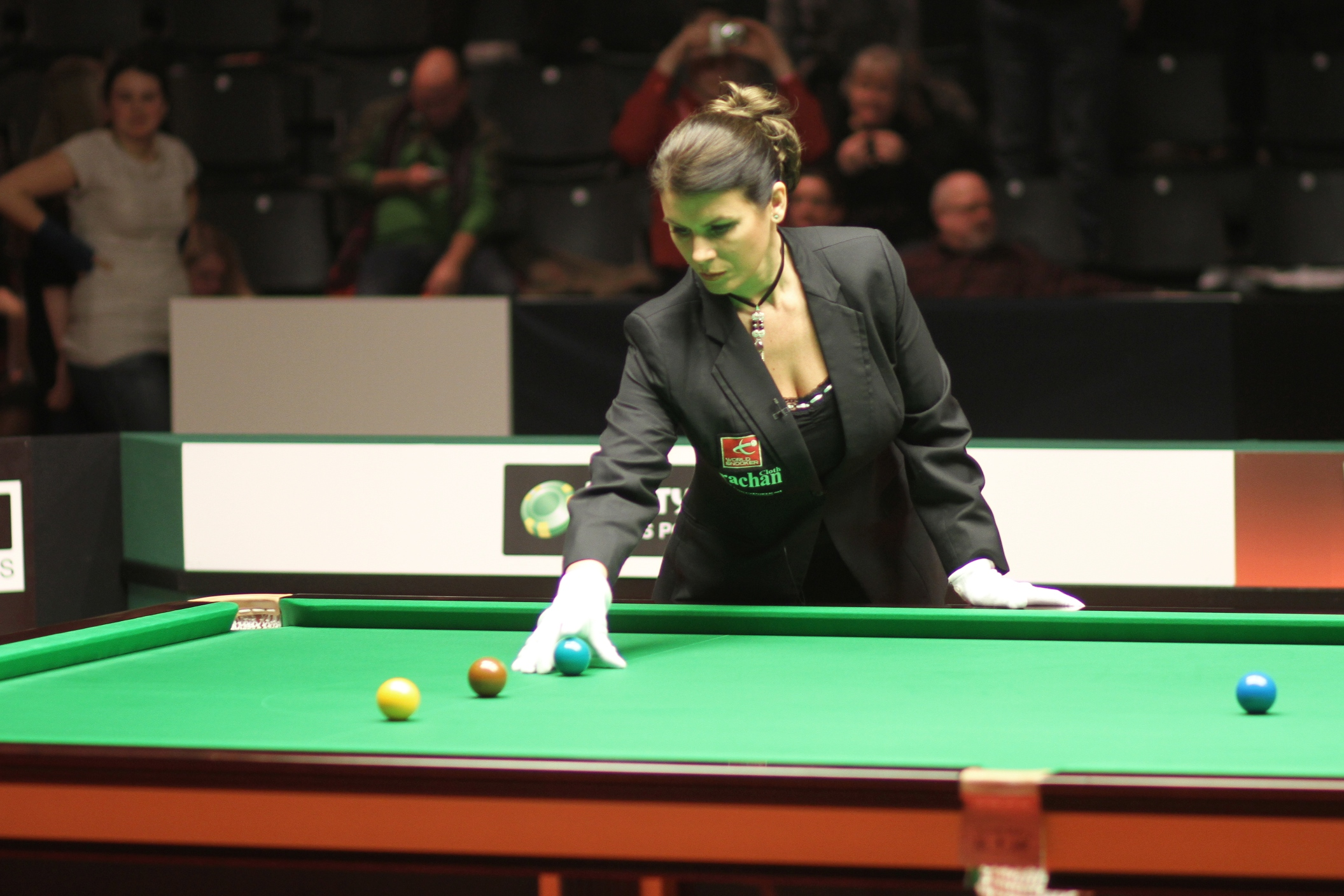 Schiedsrichterin Michaela Tabb beim Finale der German Masters 2012 Snookerturnier im berliner Tempodrom